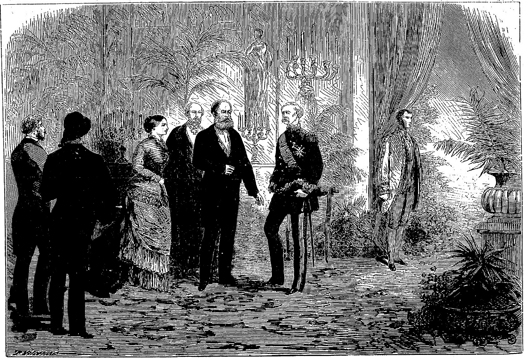 Visite du Maréchal-Présidente a LL. MM.l'Empereur et l'Empératrice du Brésil, au Grand-Hotel